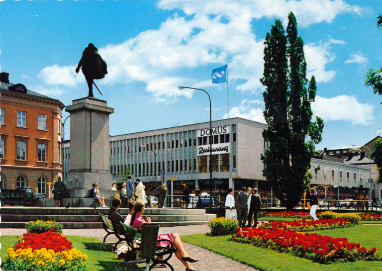 Domus, Karlstad. Arkitekt Herman Borendal